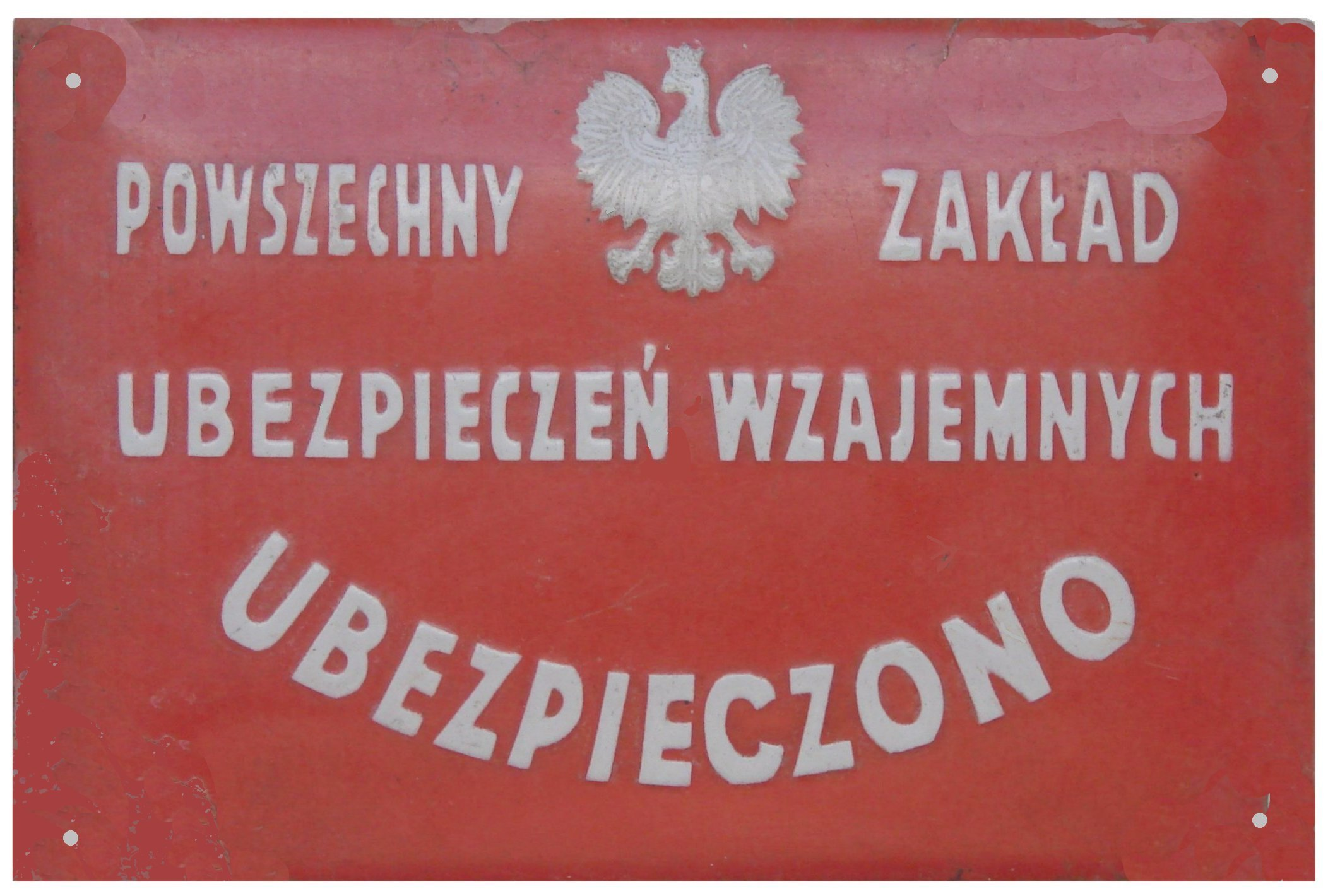 Przedwojenna tablica wieszana na ubezpieczonych obiektach przez Powszechny Zakład Ubezpieczeń Wzajemnych (PZUW) po roku 1927